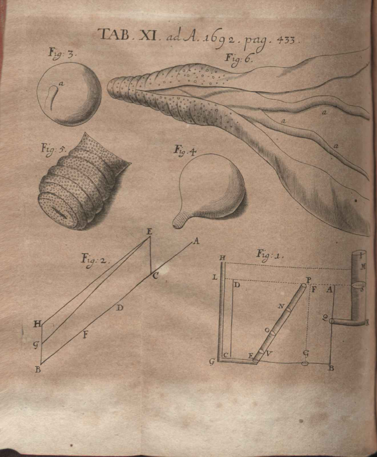 Illustration